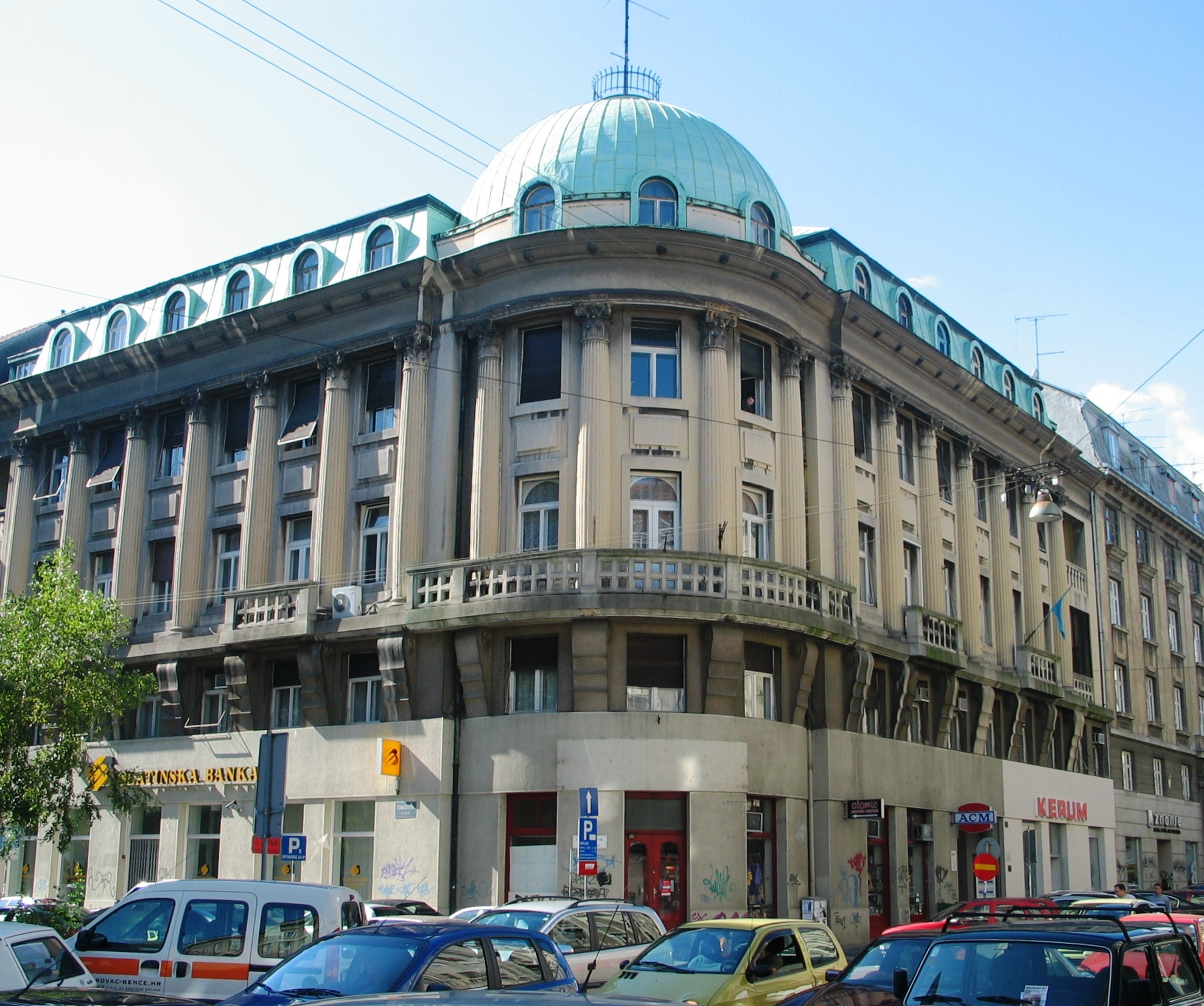 Slavko Benedikt i Aladar Baranyai Martićeva 14- Tomašićeva ul. Hrv. sveopća banka, (1922-1926.)